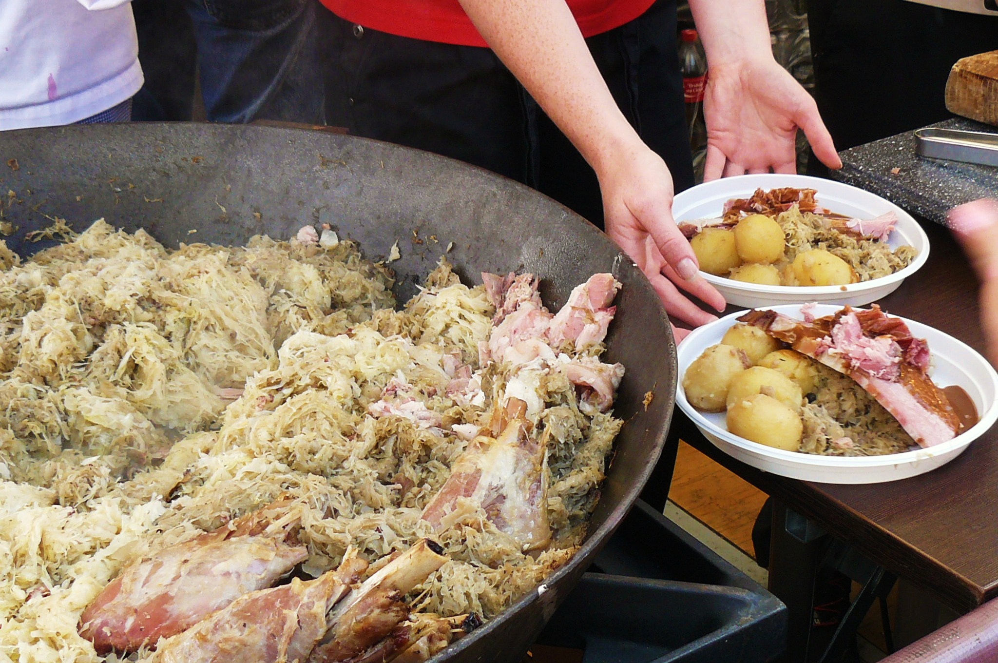 Festiwal Dobrego Smaku 2014, Poznań, Stary Rynek. Golonka z kapustą.